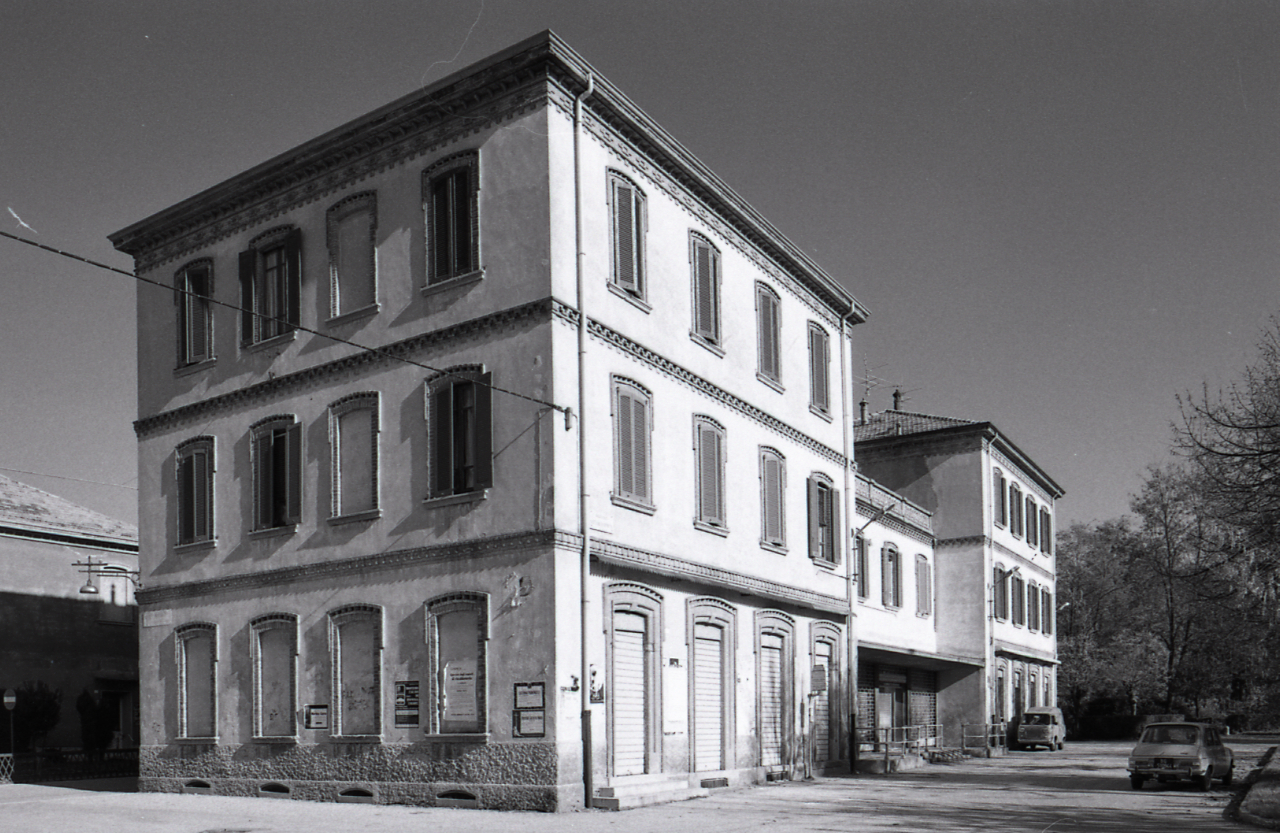 Servizio fotografico : Capriate San Gervasio, 1979 / Paolo Monti. - Strisce: 7, Fotogrammi complessivi: 35 : Negativo b/n, gelatina bromuro d'argento/ pellicola ; 35 mm. - ((Sul portanegativi: N[I]K[MA]T FP4 e iscrizione tipografica commerciale: "KINO - CINE - FOTO - OTTICA/ Corso Sempione 3/ 20145 Milano/ Telefoni/ 347769 - 381662 [cancellato a pennarello nero]; stampa tipografica a inchiostro rosso "K". Iscrizione documentaria manoscritta a penna nera: "1° viaggio". - Occasione: Pubblicazione (Einaudi, 1981) [1° viaggio]. - Fonte: Agenda di Paolo Monti: Nikon Leika 3001-/ Monti 1978 (1978-1982), presso Archivio Paolo Monti. - Fonte: Monografia: Villaggi operai in Italia: la Val Padana e Crespi d'Adda, Torino, Einaudi (1981). - Fonte: Fattura di Paolo Monti: IV. Commesse/ Fattura n. 09/ Riprese fotografiche per volume Villaggi operai (1981/03/10), presso Archivio Paolo Monti. N. 39 fotografie formato 24x30 scelte da oltre 100 eseguite a Crespi d'Adda in due viaggi successivi. N. 15 fotografie come sopra per il Professor Amerigo Restucci di Venezia